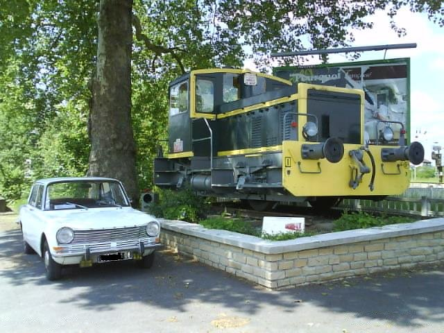 LOCOTRACTEUR Y2410 CONSERVE EN MONUMENT PAR LA VILLE DE CHARLEVILLE-MEZIERES(France), Proche de la petite gare de Mohon